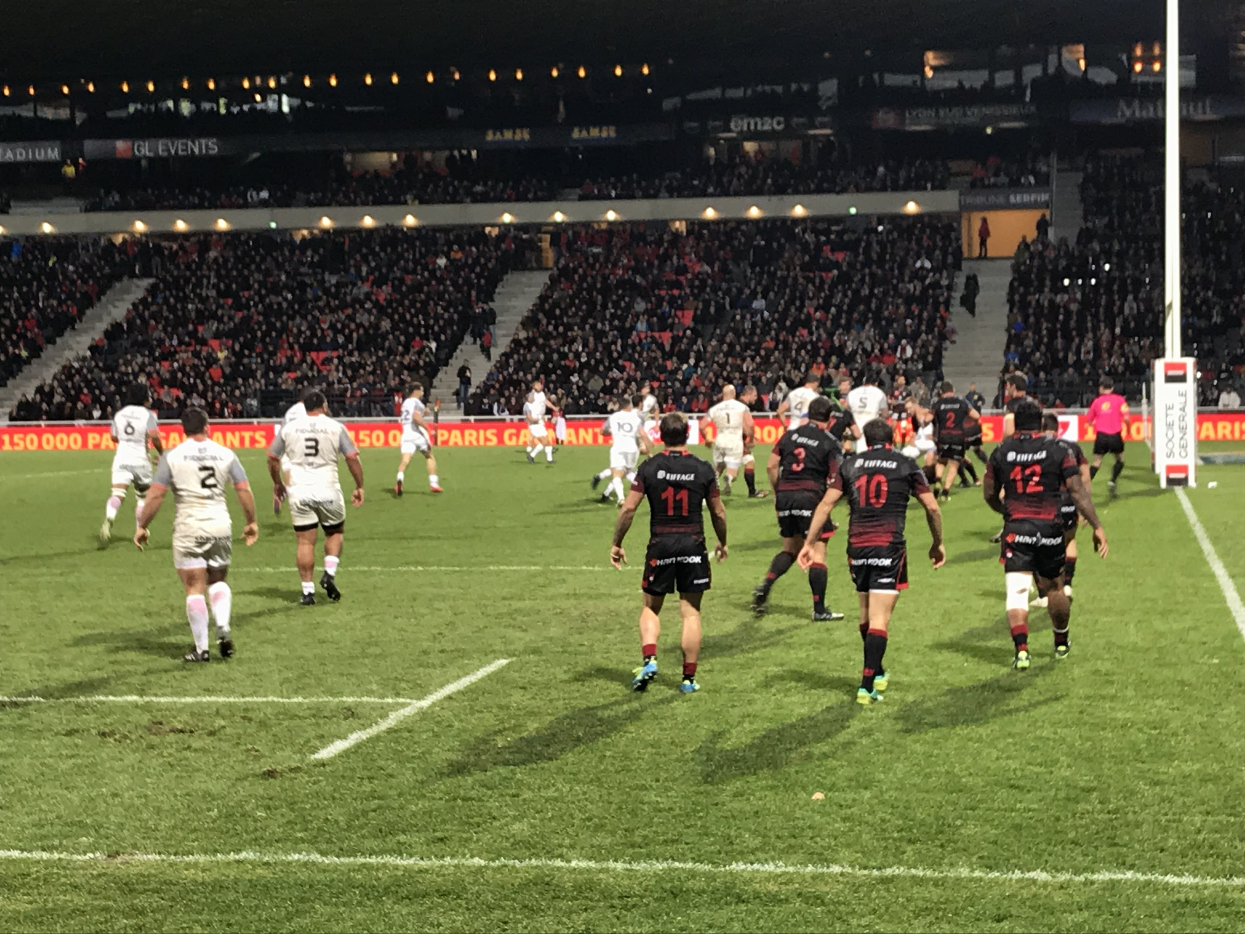 2017-18 Top 14 Lyon vs Toulouse.